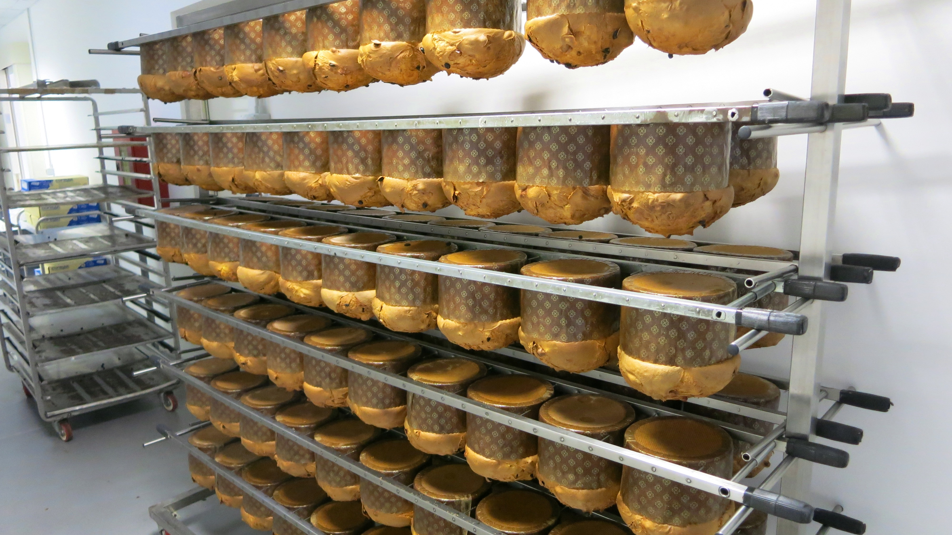 Panettone suspended upside-down on rack in prison kitchen of "Due Palazzi di Padova" in Padova, Italy.